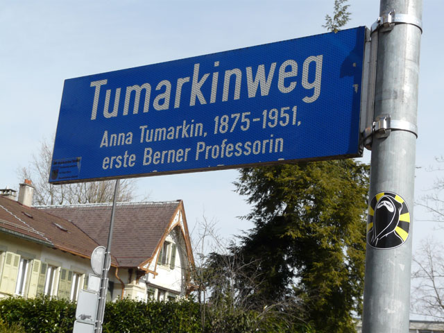 Heue erinnert der Tumarkinweg im Gelände der Universität Bern an die russische Philosophin Anna Tumarkin. Sie war europaweit die erste Professorin.